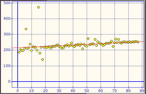 example for the article "Coeficiente de correlação de postos de Spearman" on the